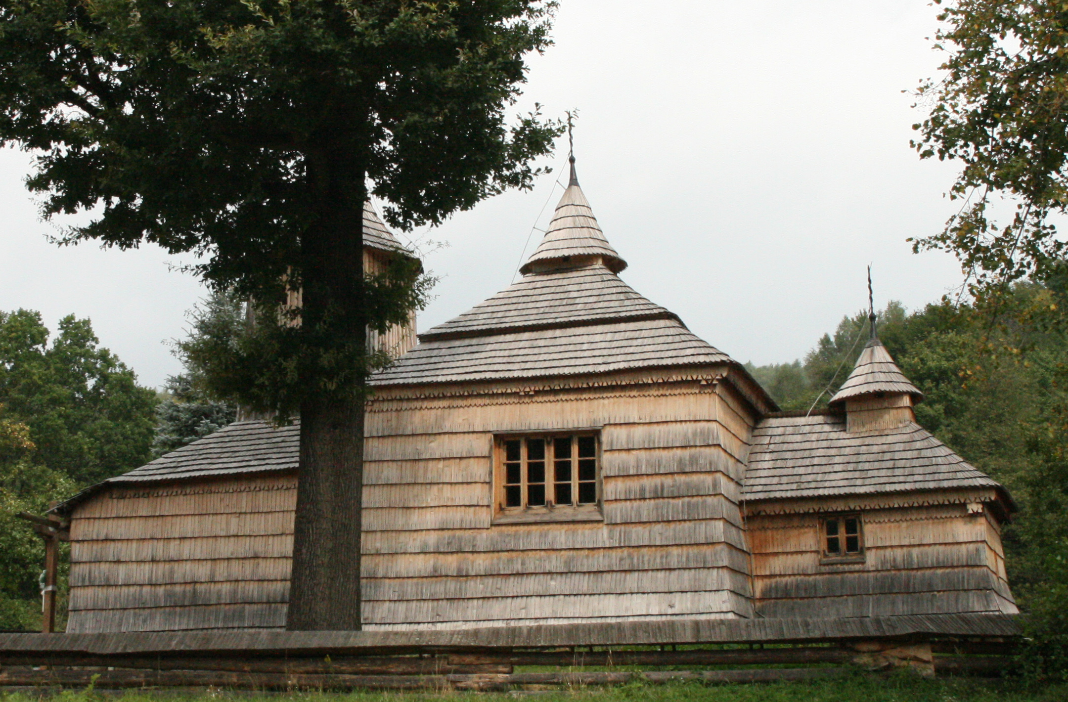 Cerkov sv. Bazila Veľkého v Krajnom Čiernom